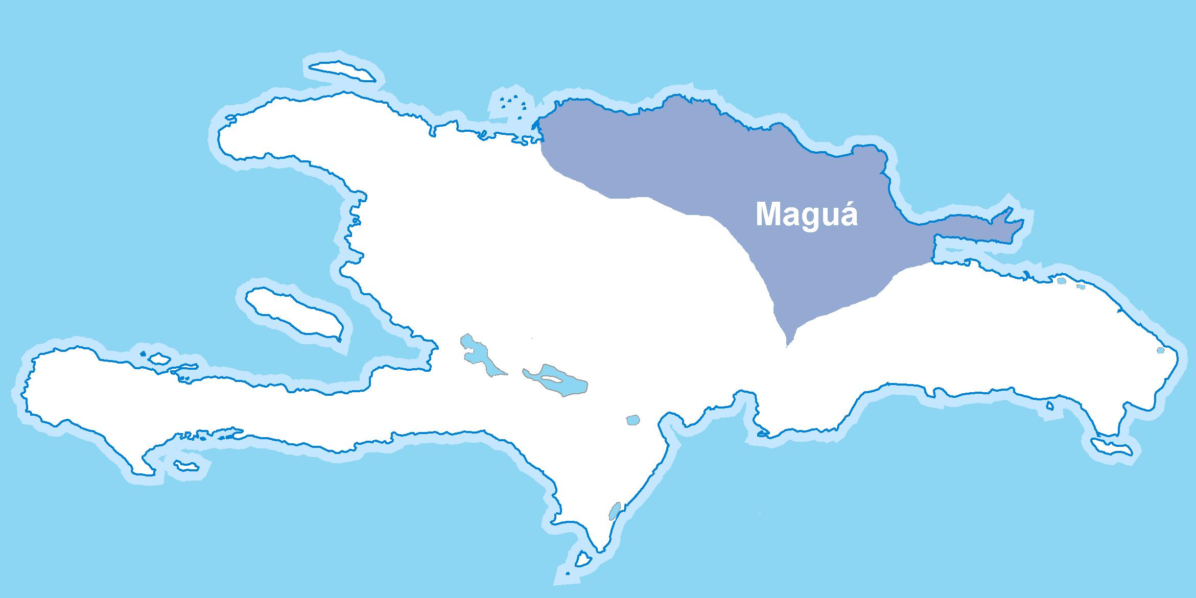 Maguá